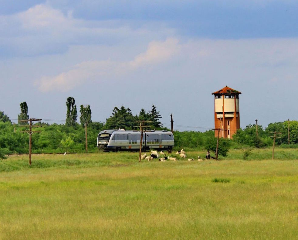 Matériel ferroviaire Desiro-Siemens en Roumanie (2015)